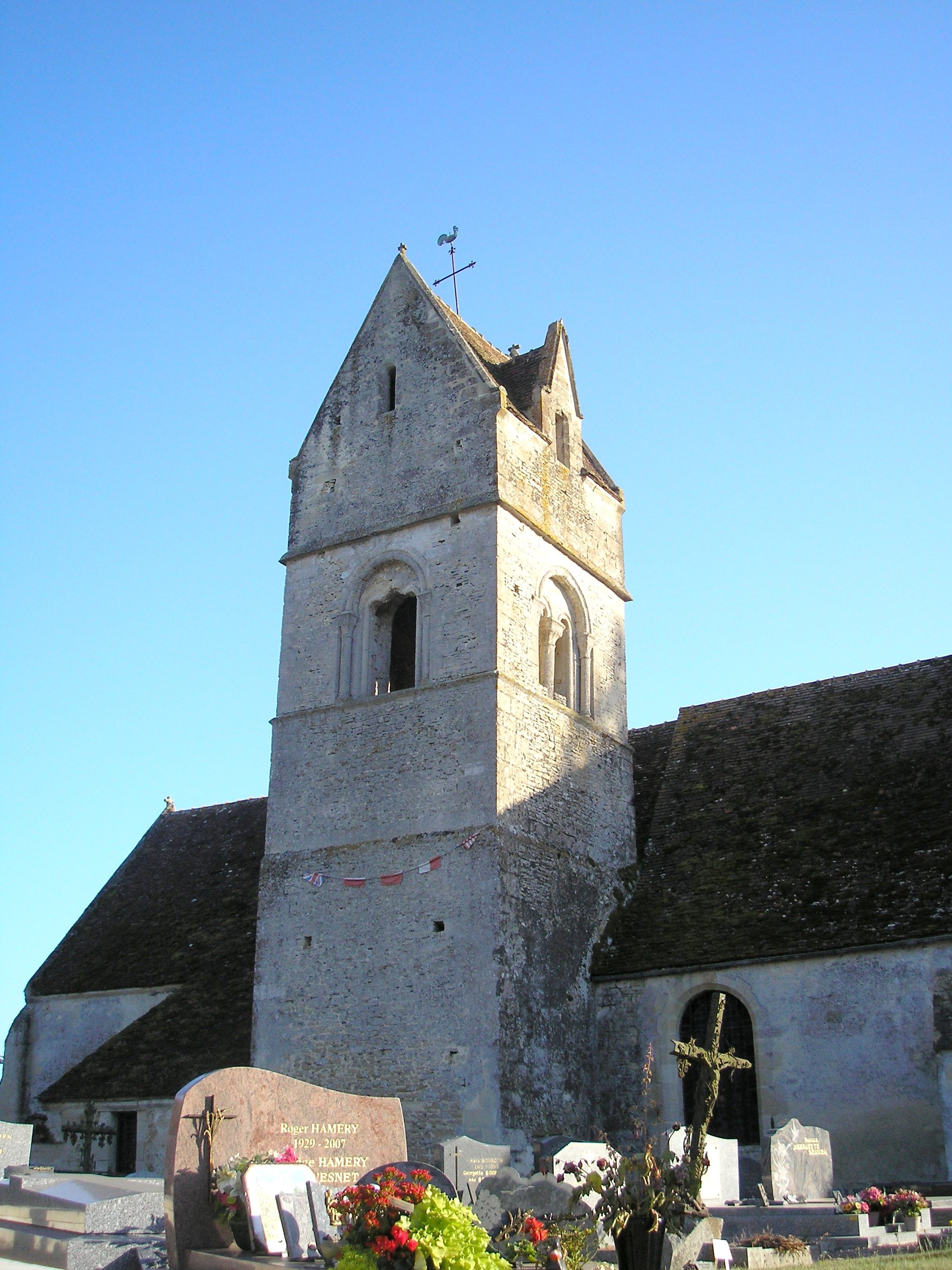 Saint-Lambert-sur-Dive (Normandie, France). Le clocher de l'église Saint-Lambert.